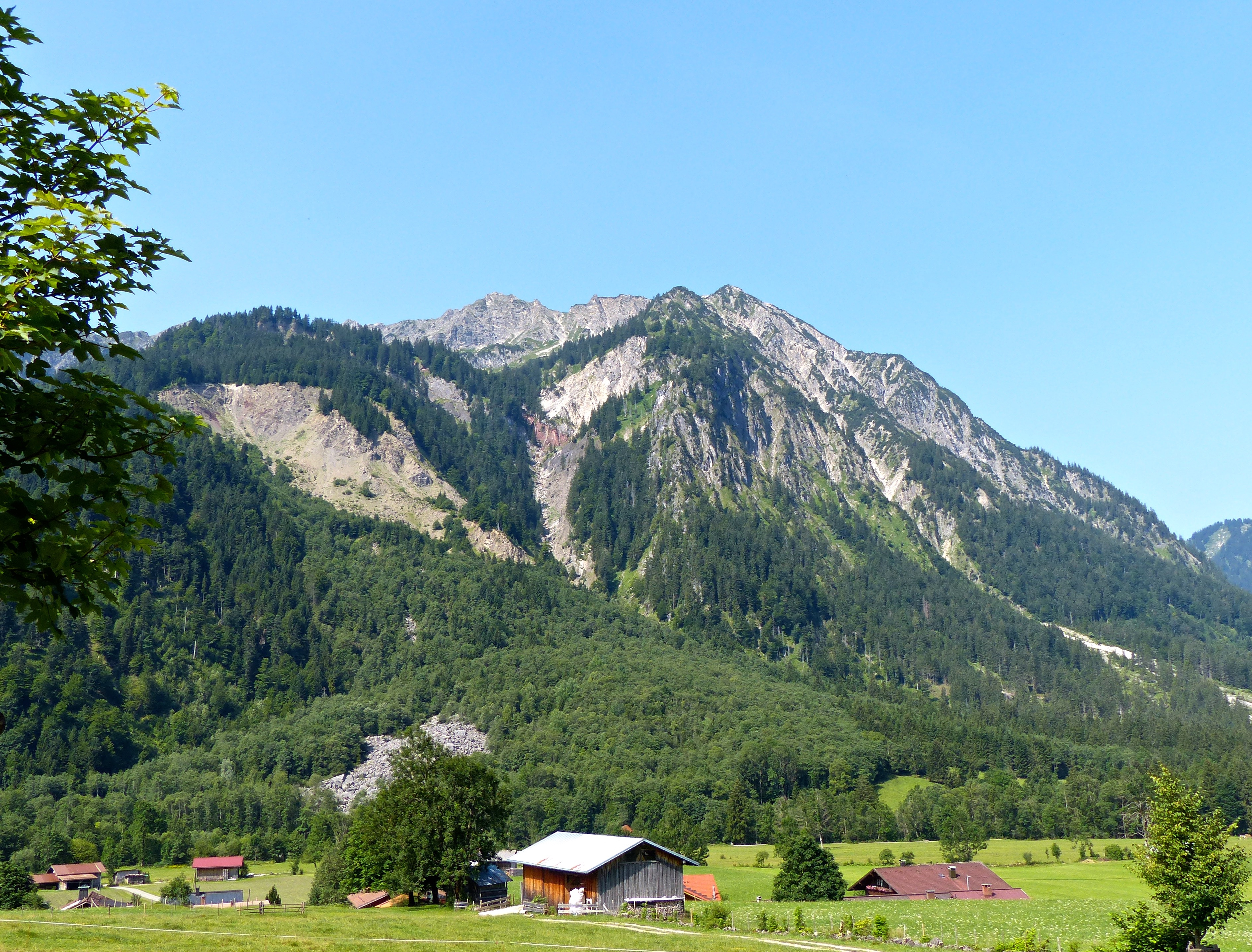 WikiProjekt Landstreicher: Felssturz Hinterstein